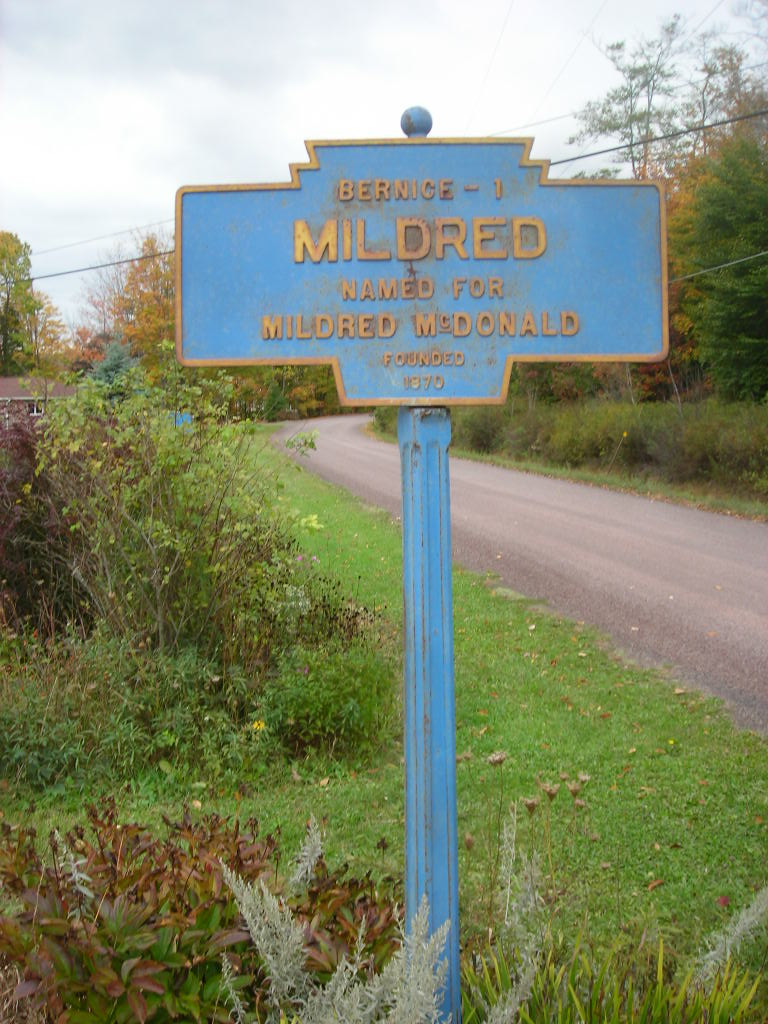 Pennsylvania Keystones Marker for Mildred, Pennsylvania